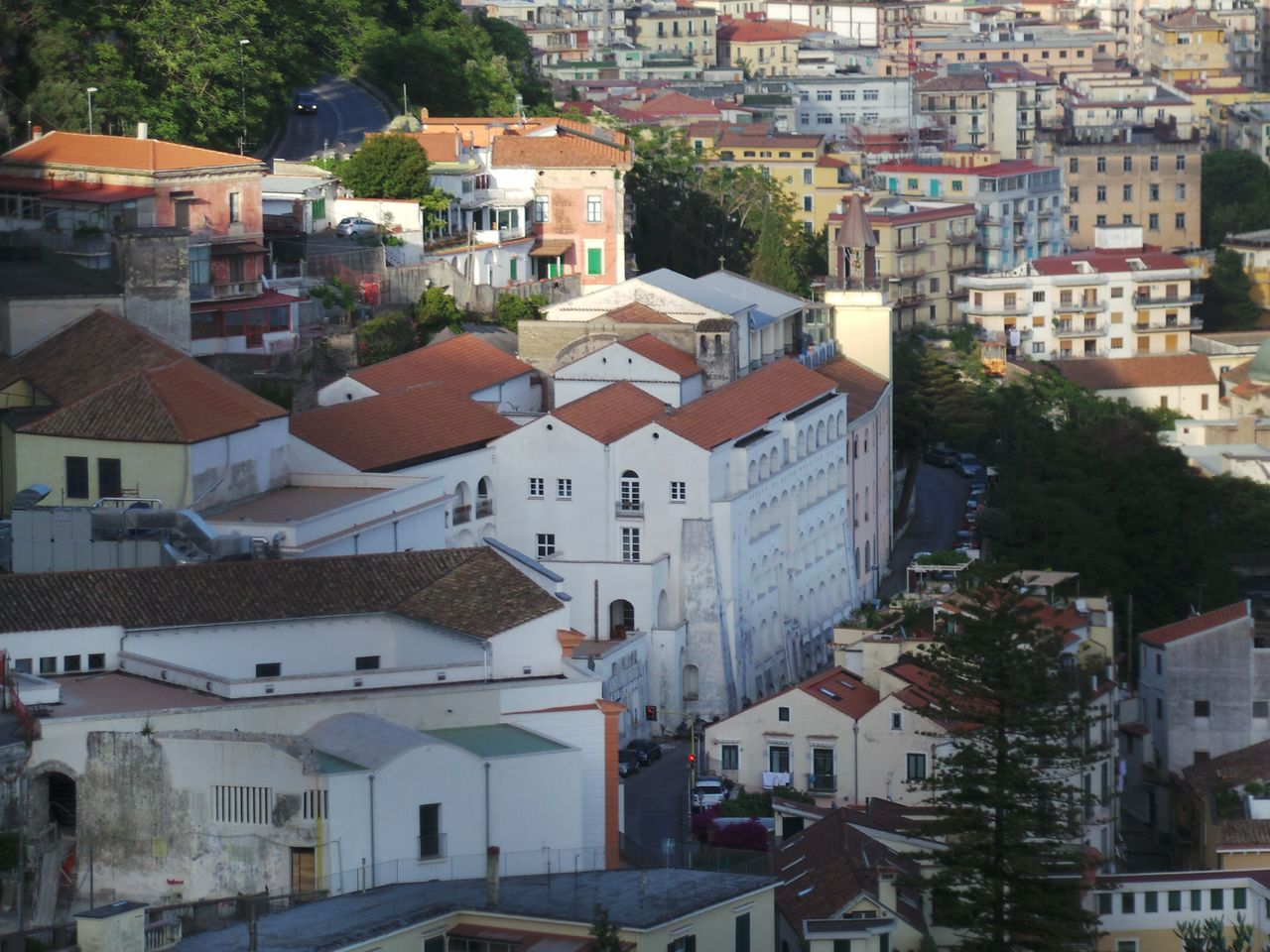 Il Rione Canalone a Salerno